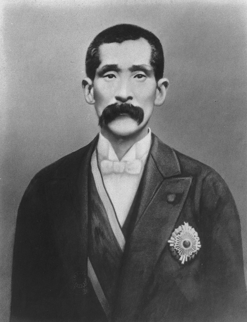 Portrait of Komura Jutaro (小村寿太郎, 1855 – 1911)